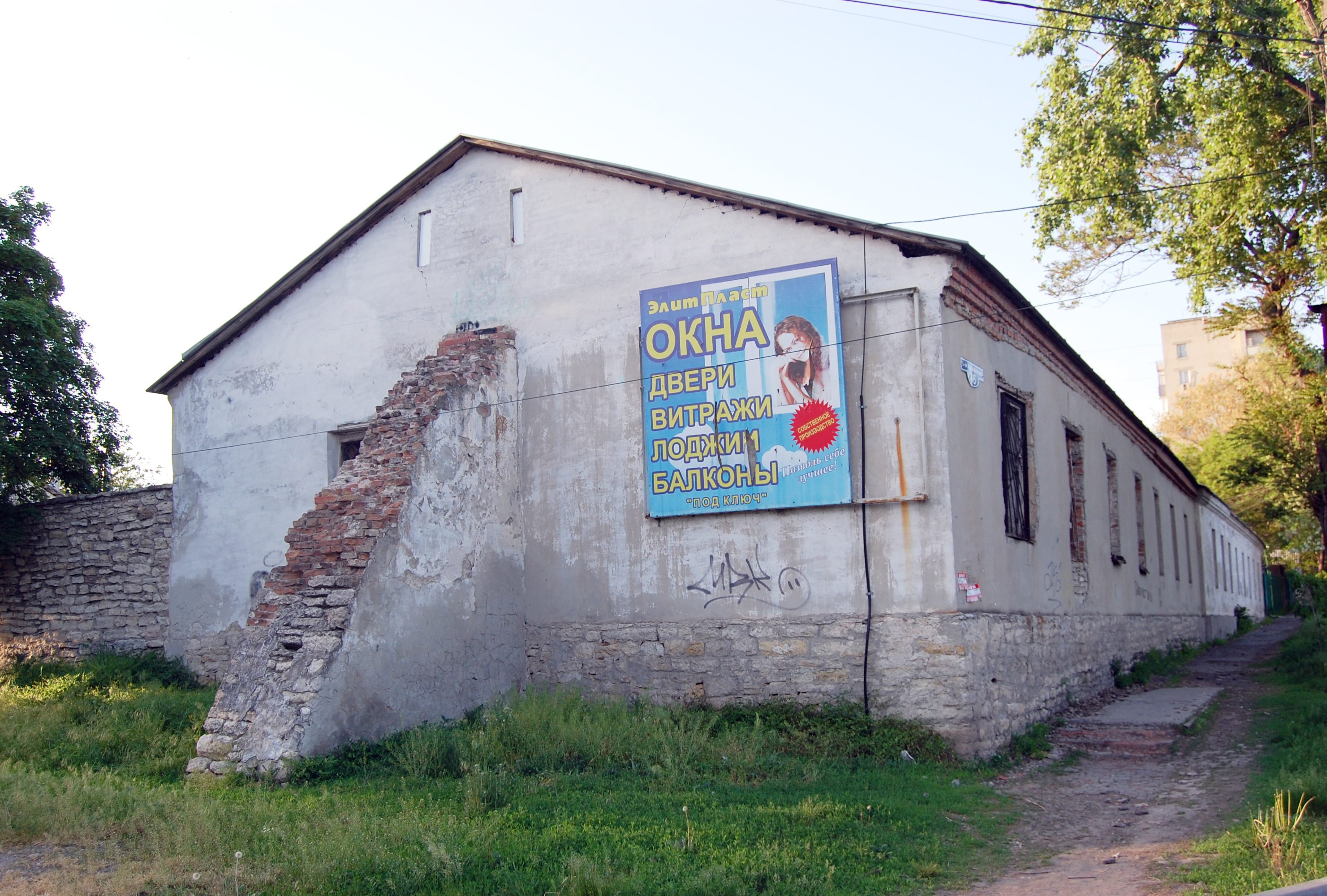 Таганрог, Петровские казармы, пер. пер. 1-й Крепостной, 46